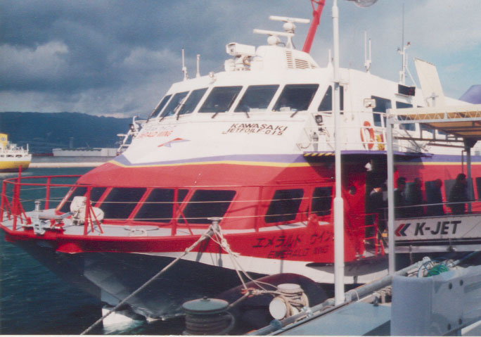 K-CAT停泊中のK-JET「エメラルドウィング」 撮影年月日不詳